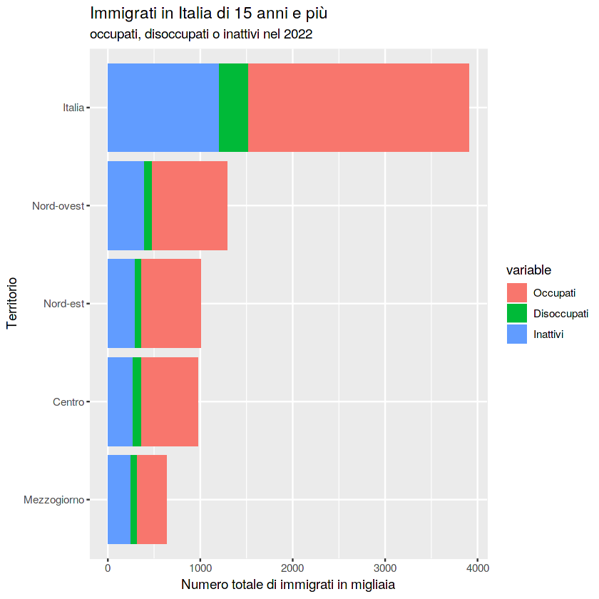 Grafico realizzato con dati Istat tramite il programma RStudio